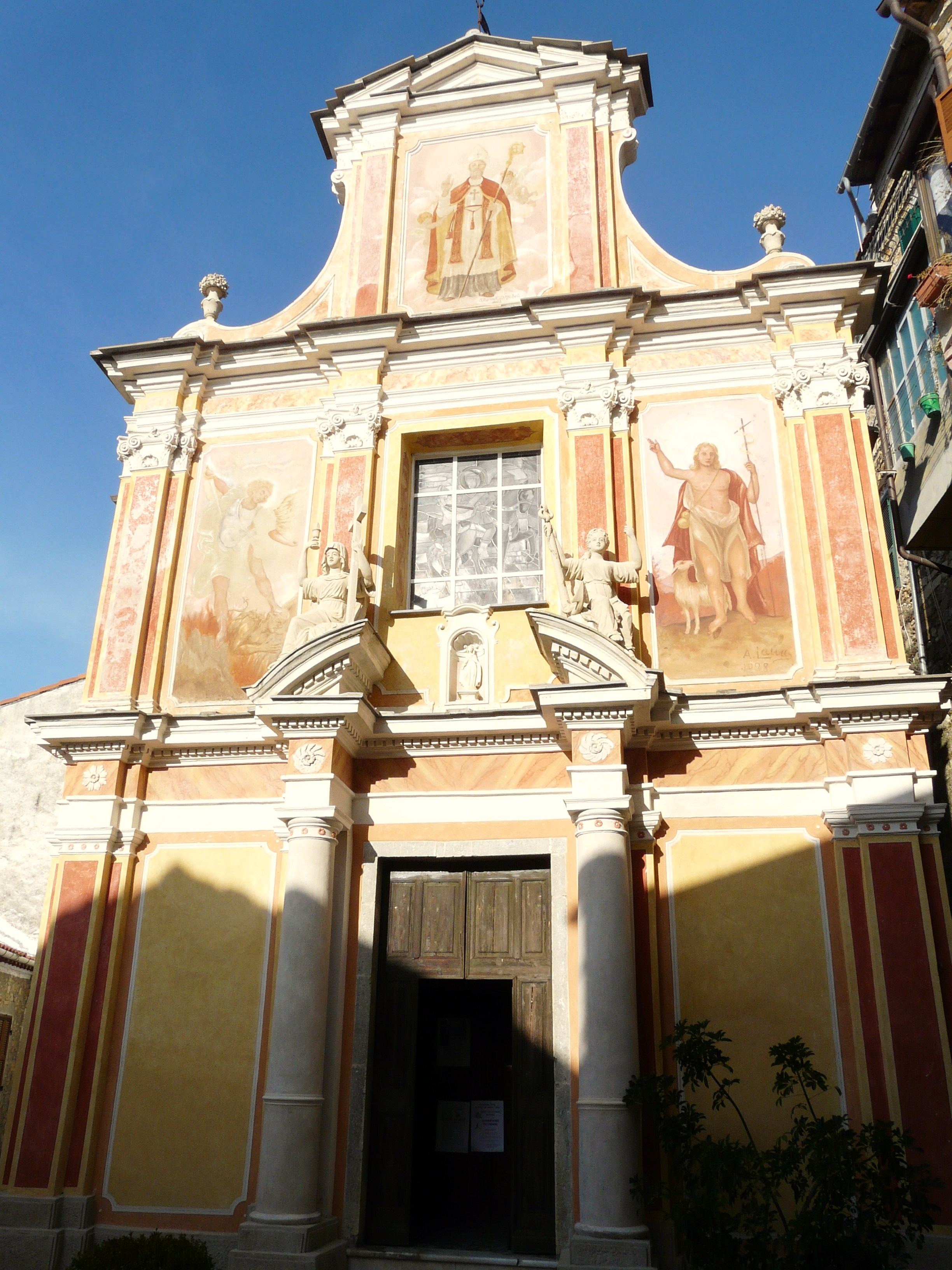 Chiesa di San Martino, Seborga, Liguria, Italia